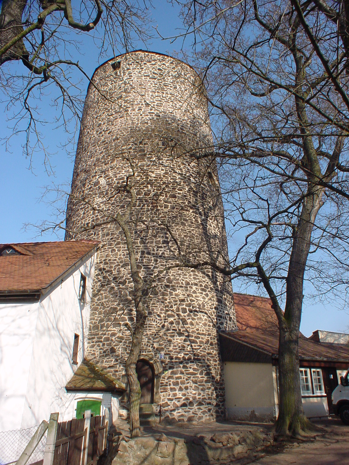 Burg Krosigk 12 Bergfried eigenes Foto von 2004, public domain